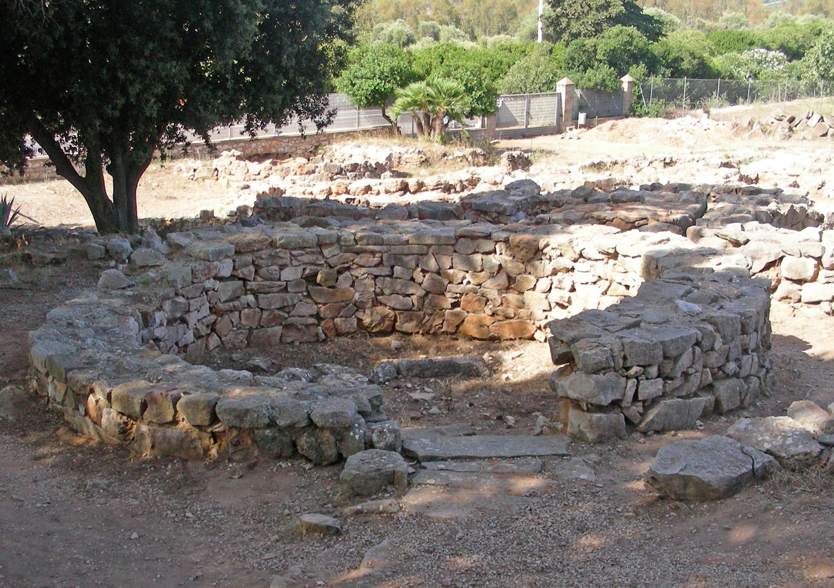 Italia, Sardegna, provincia di Sassari, Alghero, nuraghe e villaggio nuragico di Palmavera, capanna del villaggio